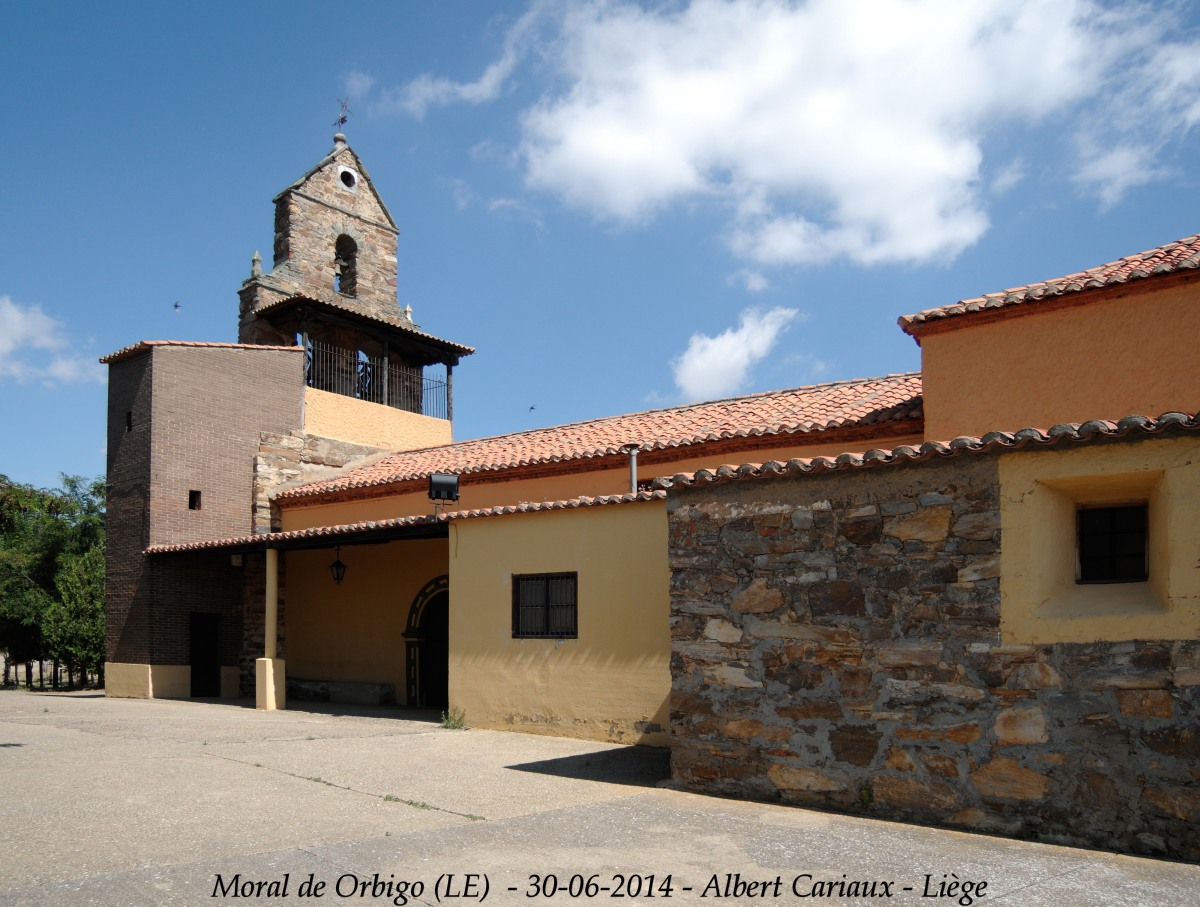 Moral de Orbigo - Iglesia - 2010